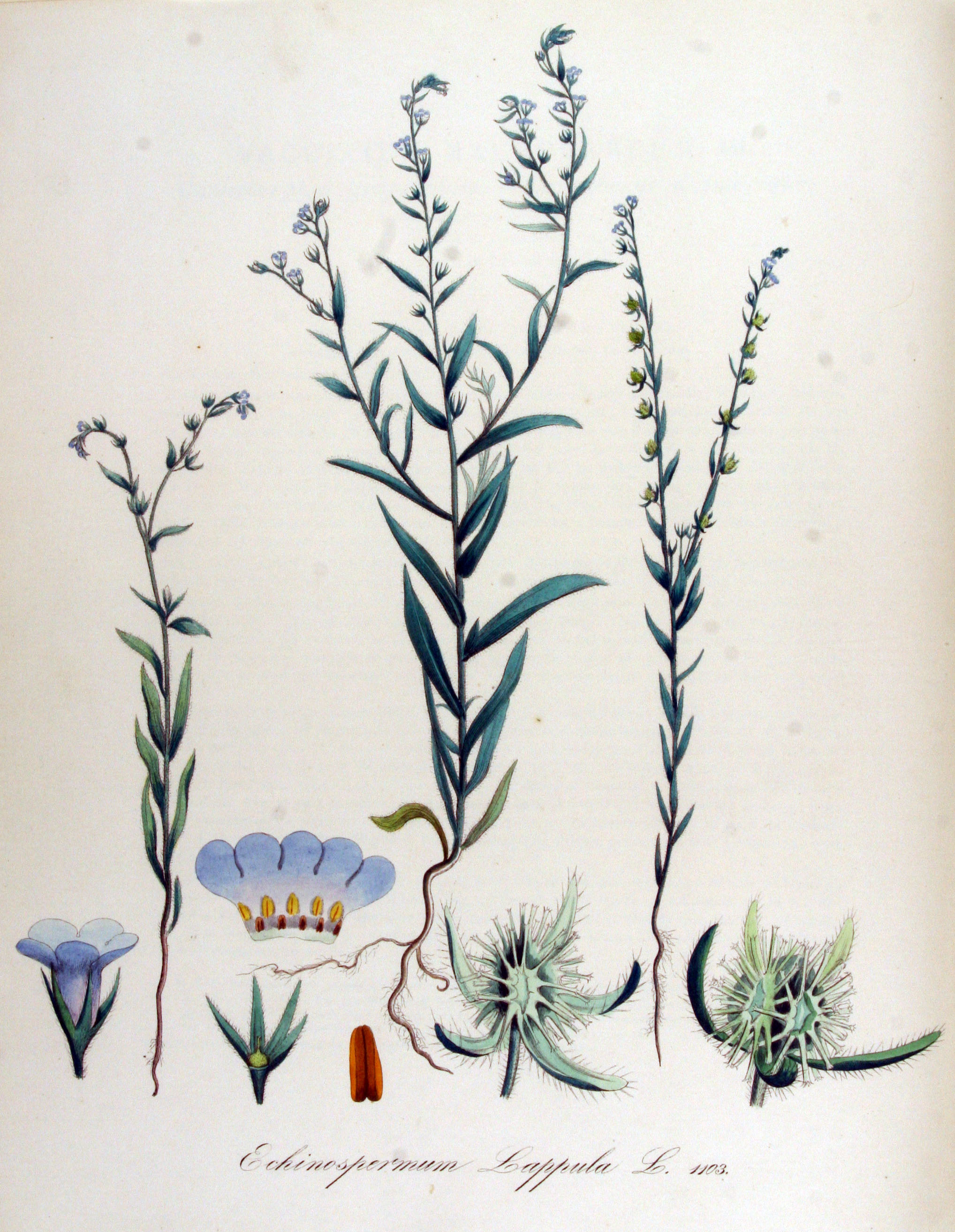 Lappula squarrosa (Retz.) Dum. (Syn. Echinosperum lappula L.)